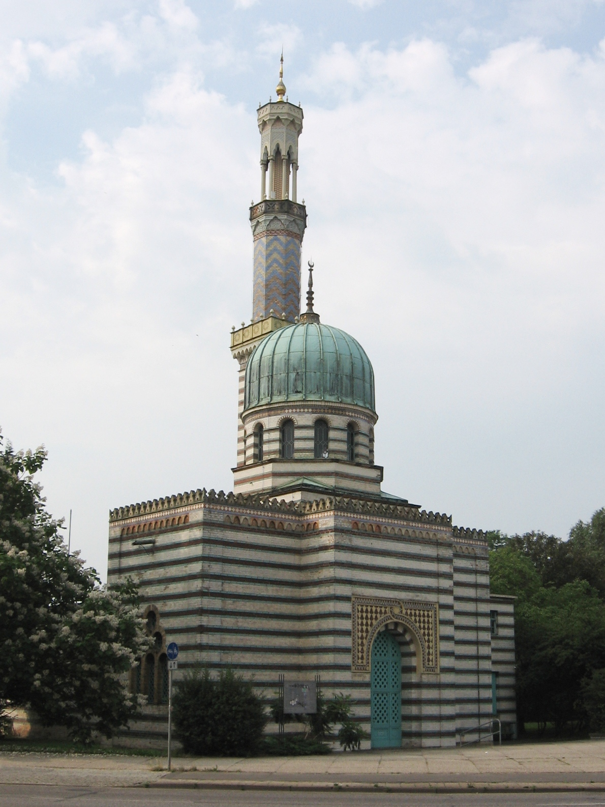 Dampfmaschinenhaus